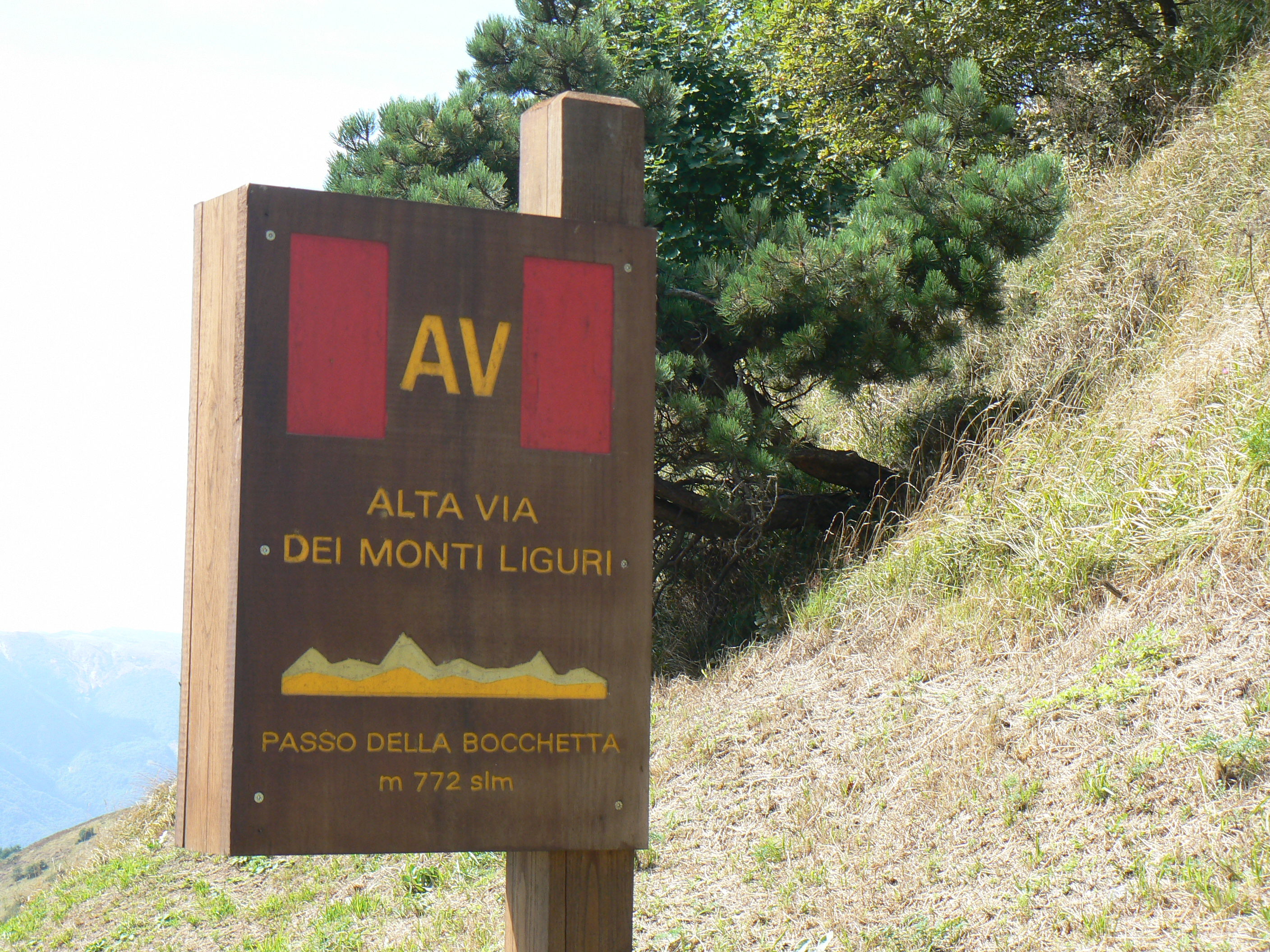 Pannello AVML. Posto tappa sul passo della Bocchetta